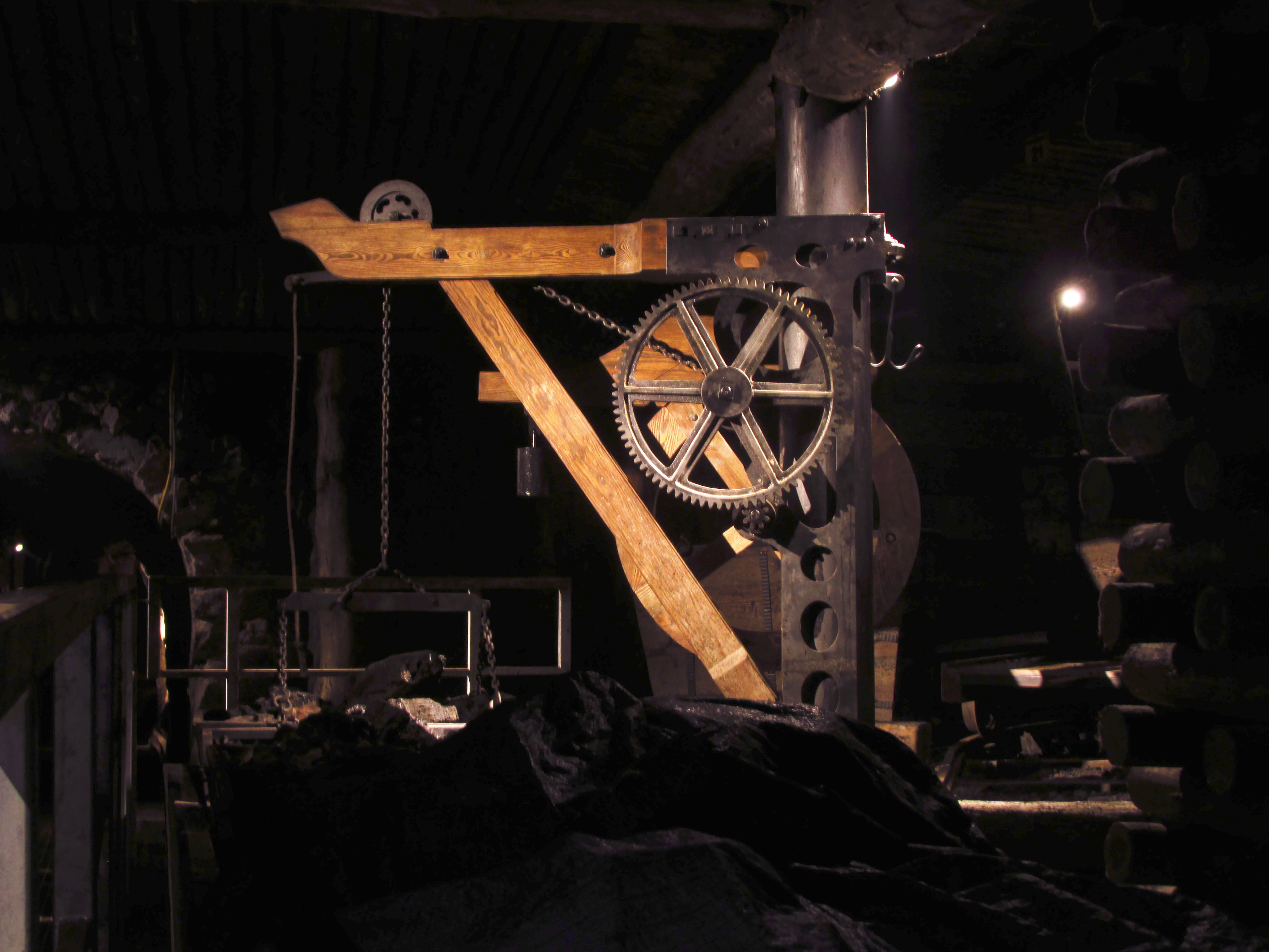 Hlavní klíčová dědičná štola, Zabrze, replika jeřábu z první poloviny 19. století v podzemním přístavu